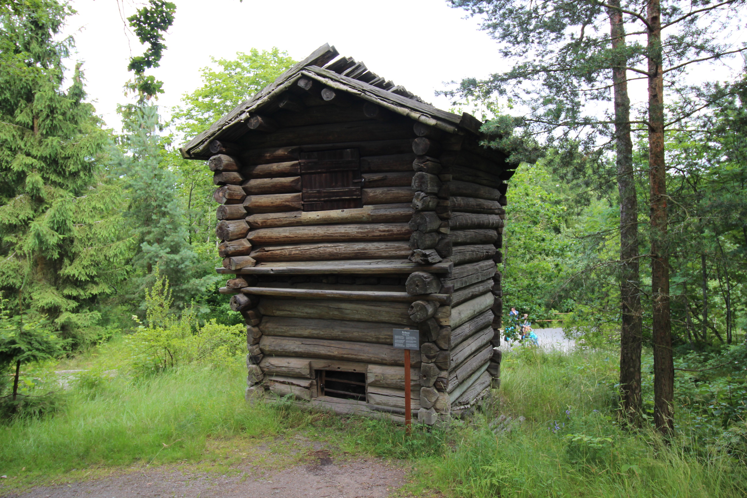 Kölnan på Skansen. Flyttad från Korteruds by i Köla socken i Värmland